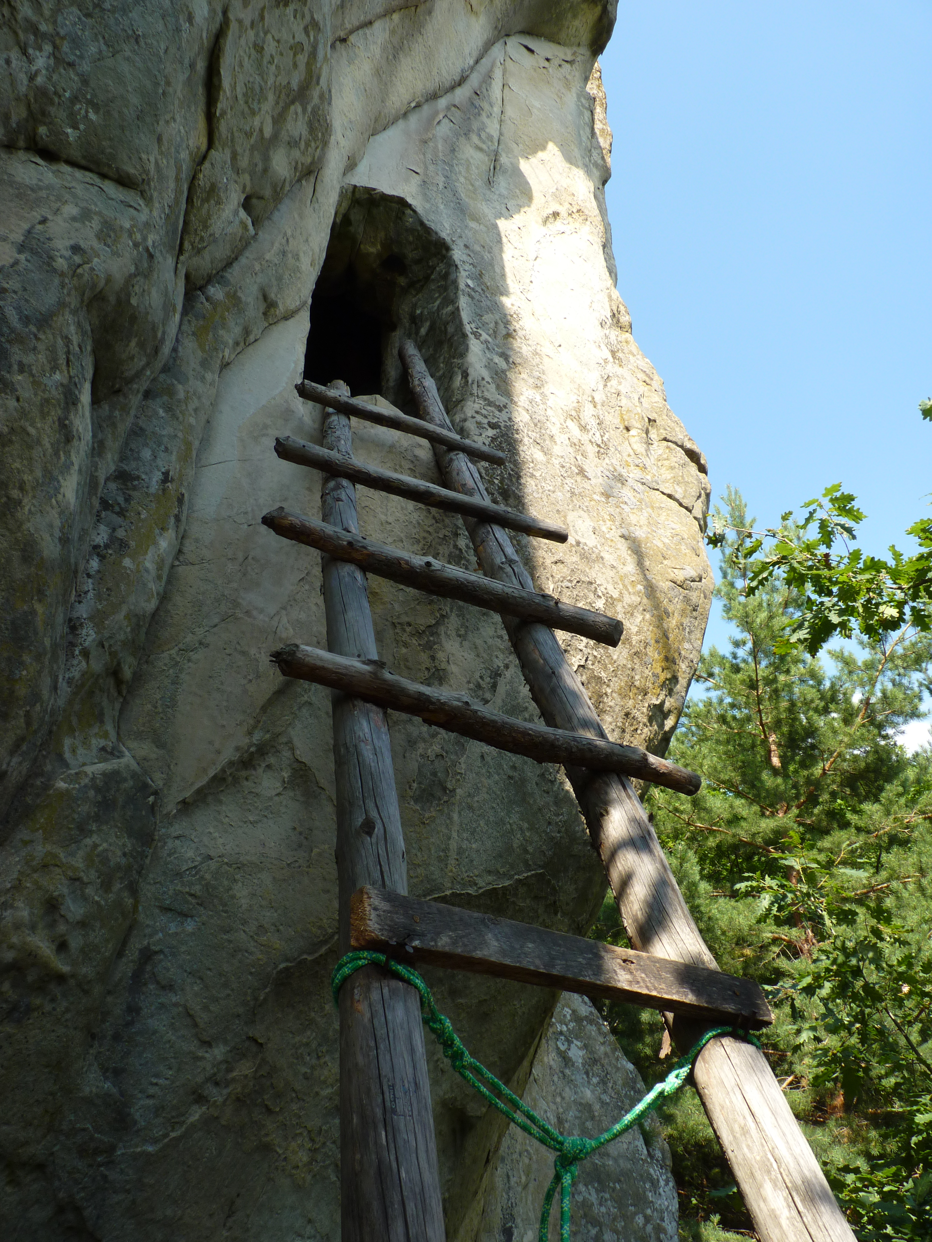 Schitul lui Dionisie Torcatorul